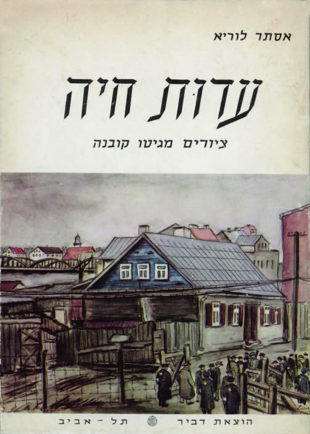 אסתר לוריא הייתה ציירת עטורת פרסים ומעצבת במה ותפאורה. זכתה פעמיים בפרס דיזנגוף. עטיפת ספרה עדות חיה